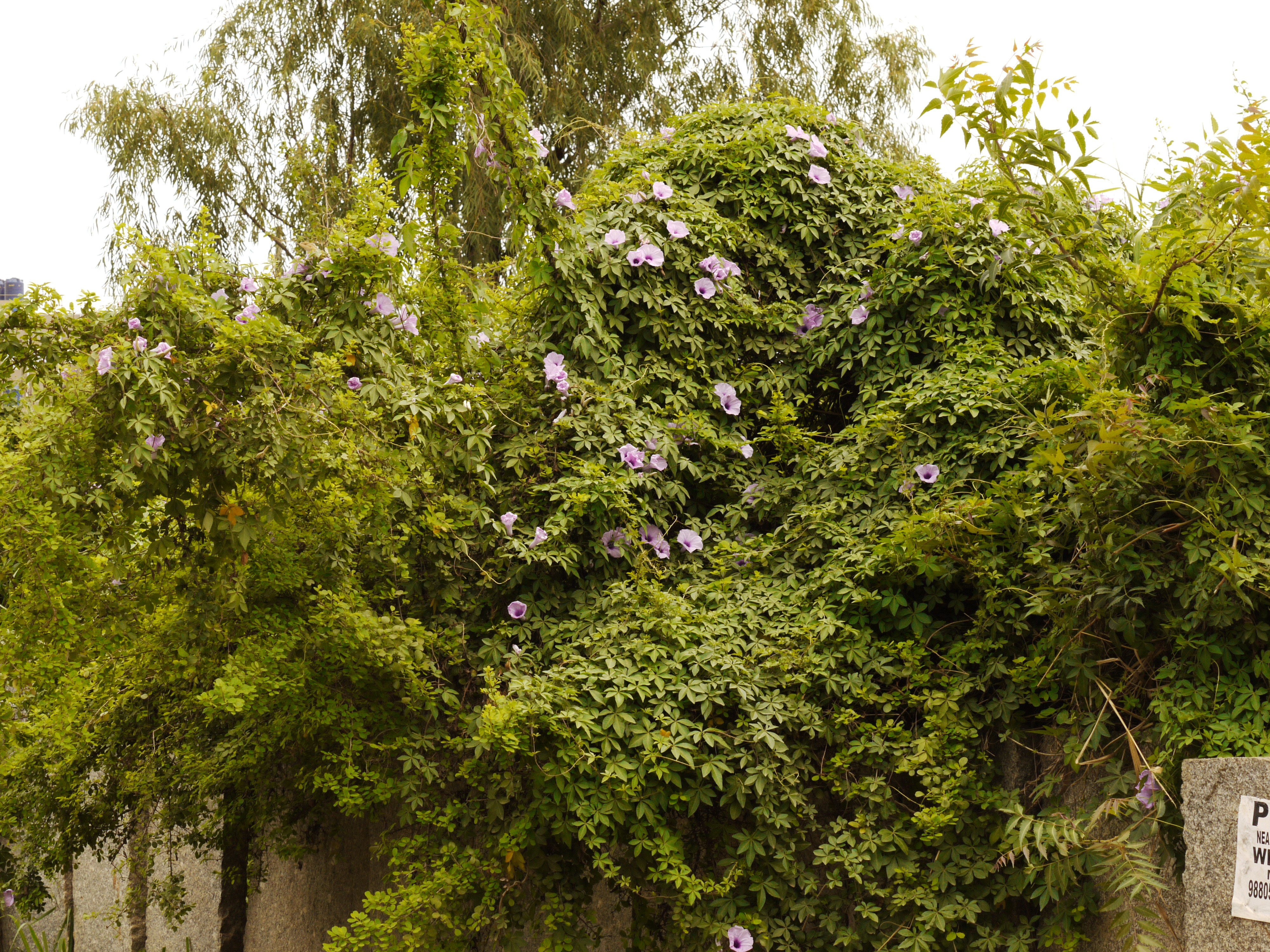 Pflanzen und Tiere aus Whitefield, Bangalore, Indien. Ipomoea cairica.